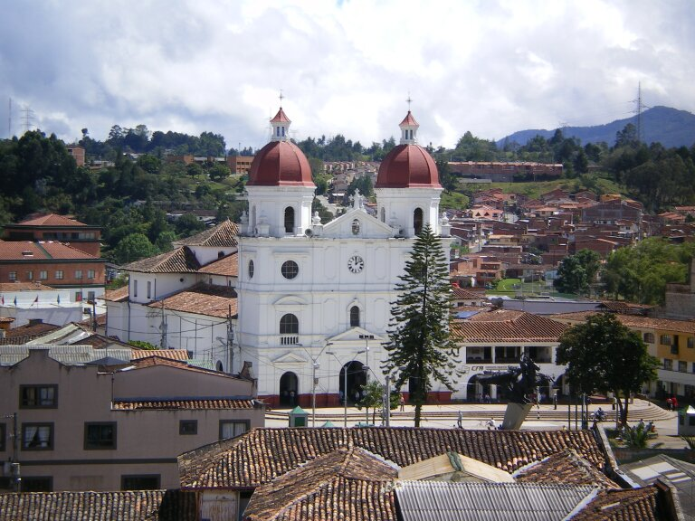 Iglesia del Municipio de Rionegro, Antioquia, Colombia